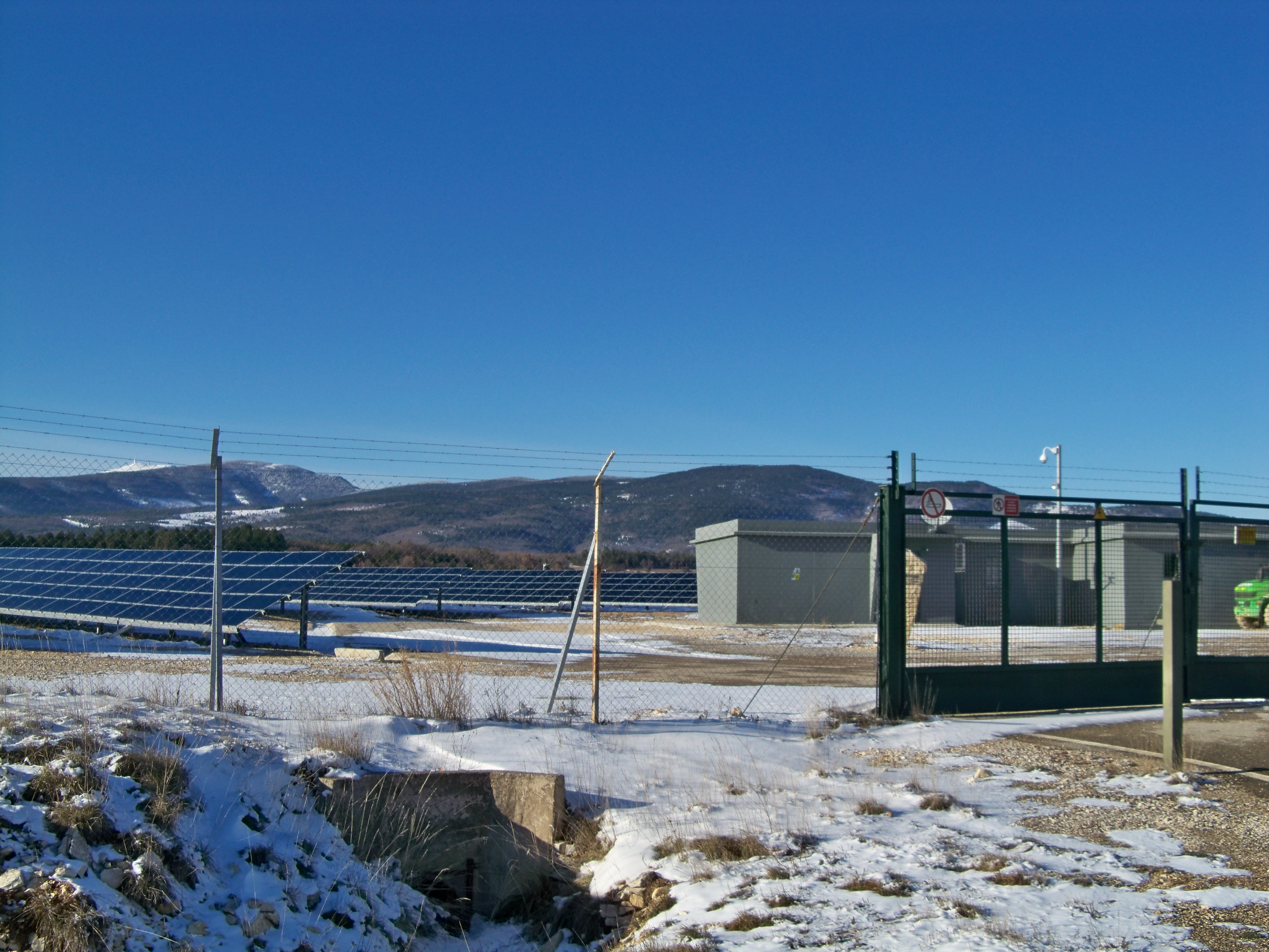 ancien silo militaire transformé en centrale photovolataique, surle Plateau d'Albion (Vaucluse, France)